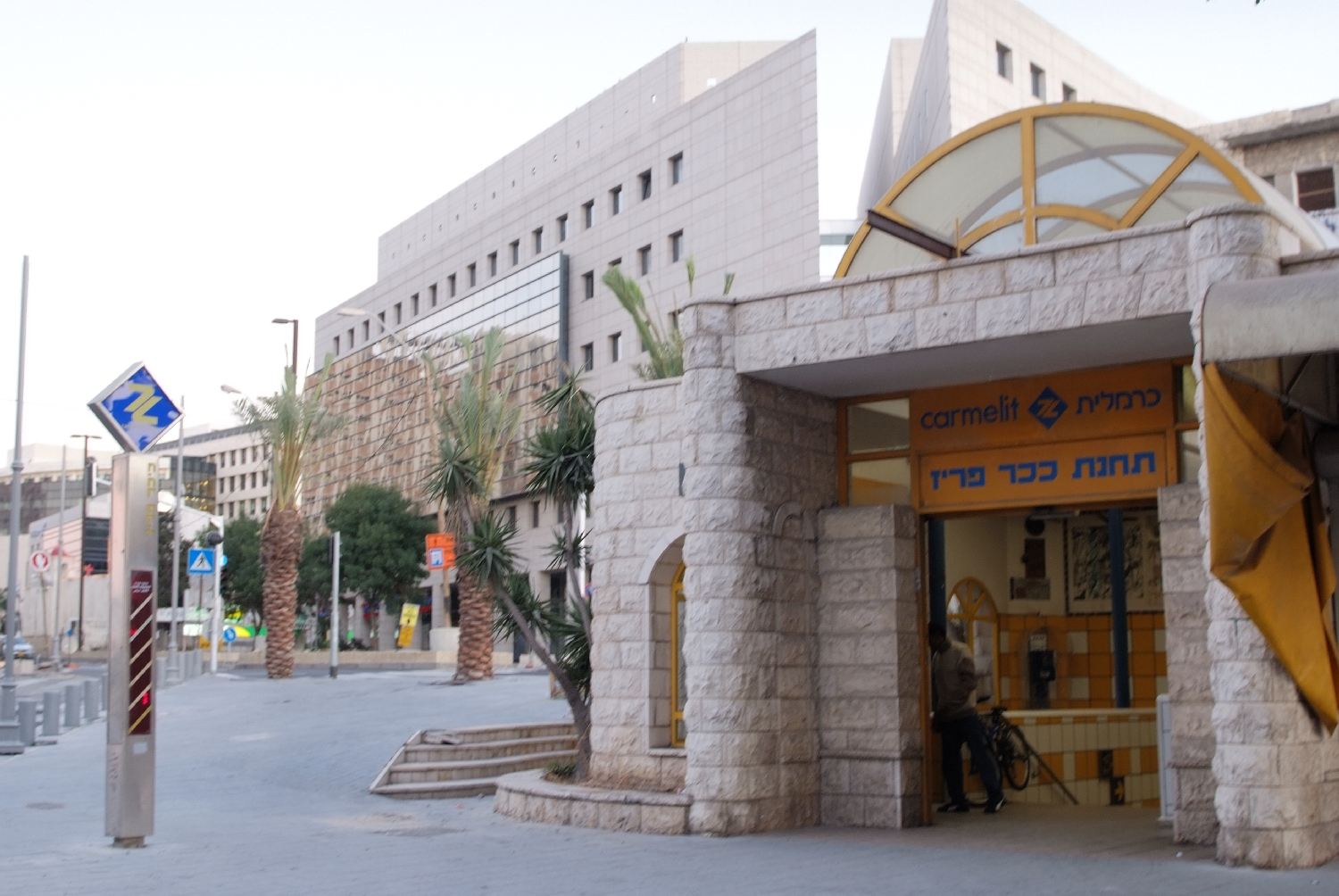 Wikimania 2011 in Haifa, Israel Carmelit Entrance / Eingang zur Carmelit (U-Bahn)